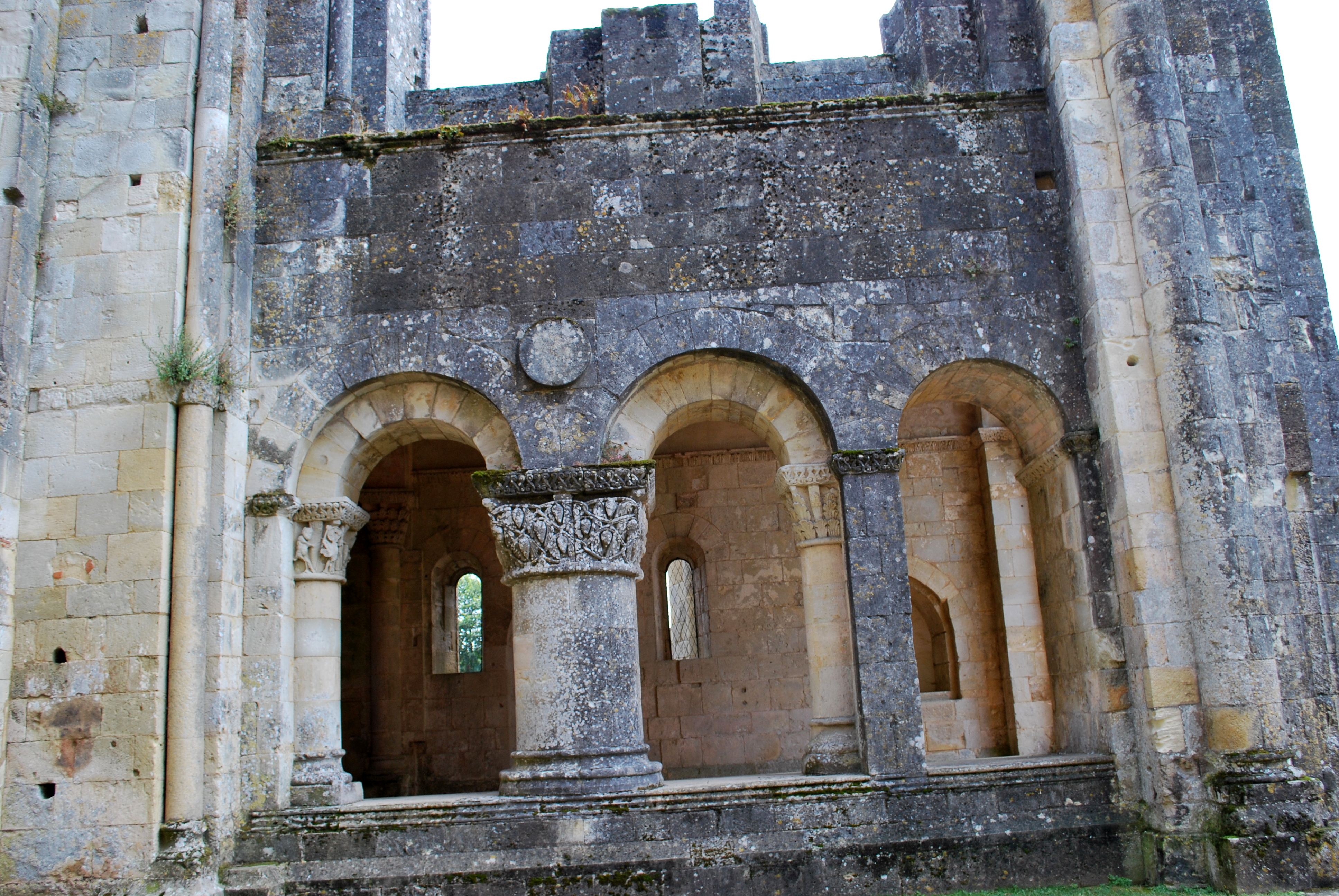 Triple arcade sud de l'Abbaye de la Sauve-Majeure